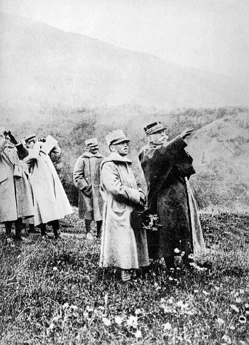 re Vittorio Emanuele III al fronte con il generale Joffre